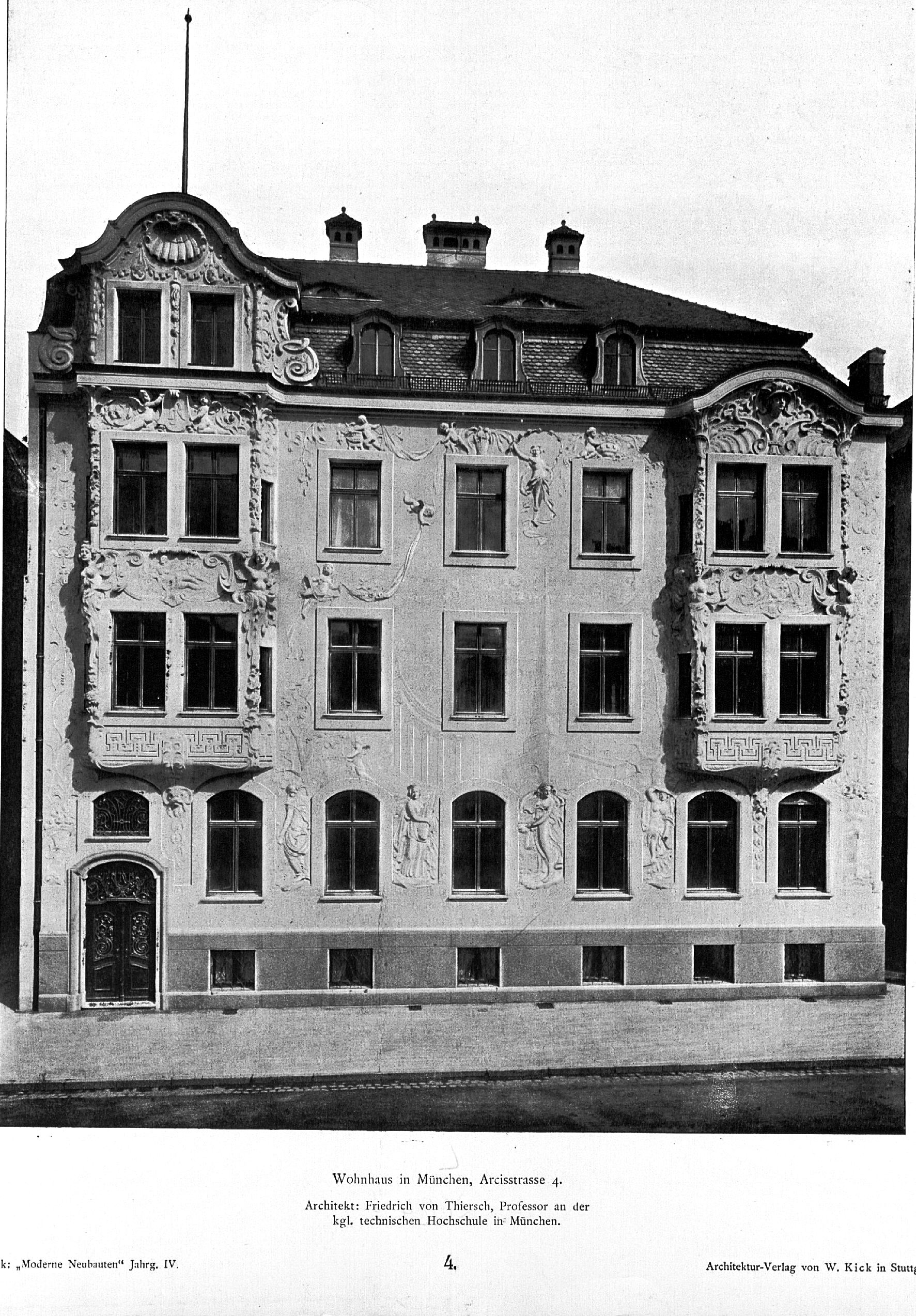 Wohnhaus_in_München_Arcisstrasse_4_Architekt_Friedrich_von_Thiersch,_Professor_an_der_kgl_techn._Hochschule_München.JPG